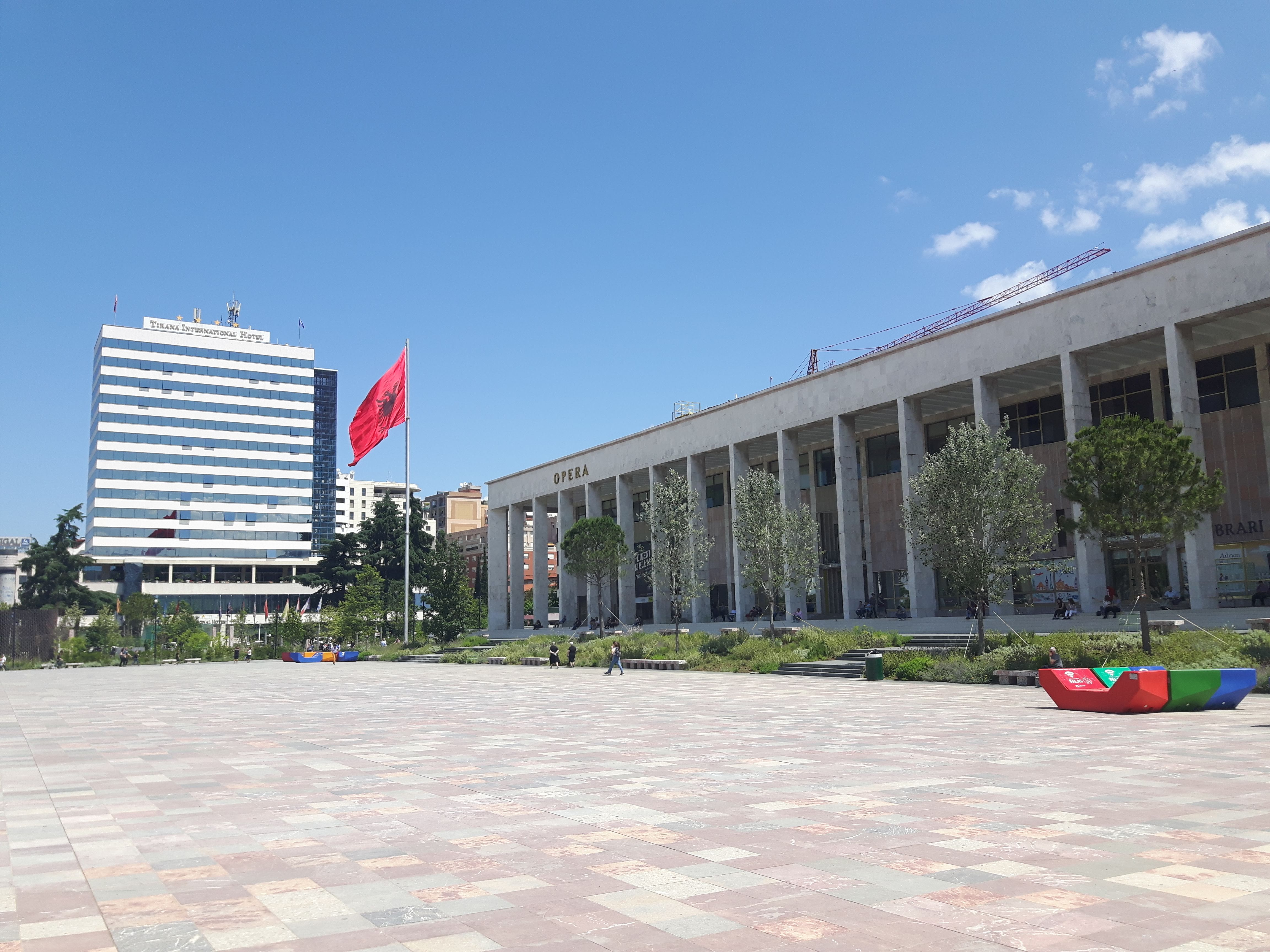 Pallati i Kulturës (Tiranë)